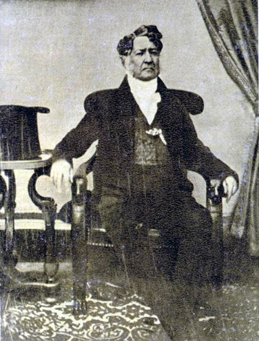 Louis-Philippe Ier (1773-1850)